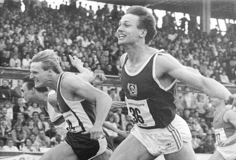 Sven Matthes, Steffen Bringmann ADN-ZB Kluge 26.6.88 Rostock: 39. DDR-Meisterschaften Leichtathletik - DDR-Meister über 100 Meter der Männer wurde am 25.6.1988 Sven Matthes (r.) vom SC Dynamo Berlin mit 10,19 sec. vor dem Leipziger Steffen Bringmann.